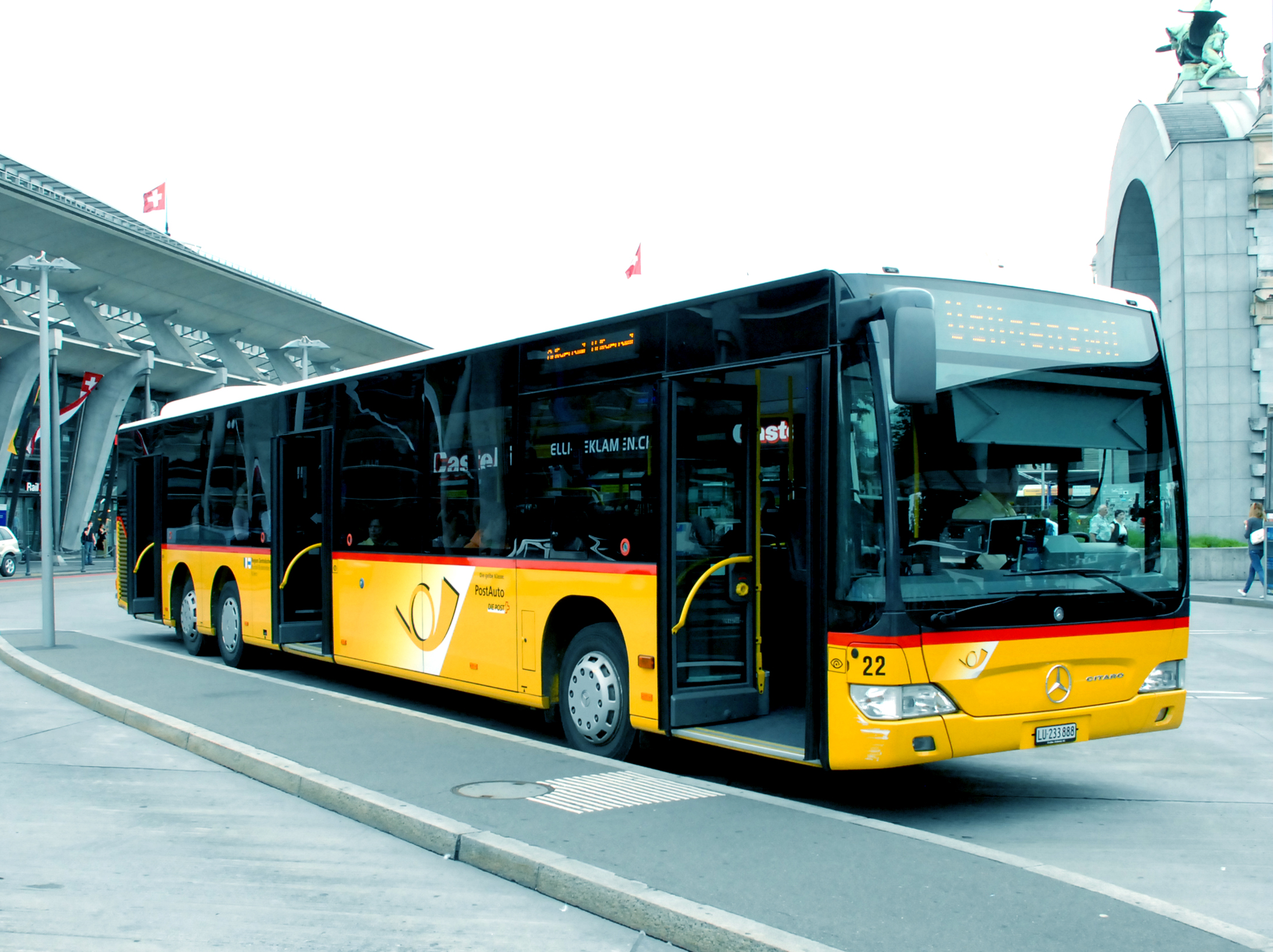 PostAuto bus 22 van Bucheli Busbetriebe AG uit Kriens. Deze bus van het type Mercedes-Benz Citaro L te Luzern.